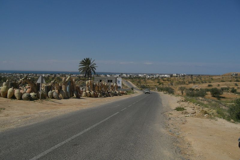 Route djerbienne par Tawfiq ZAMMEL (mars 2006)